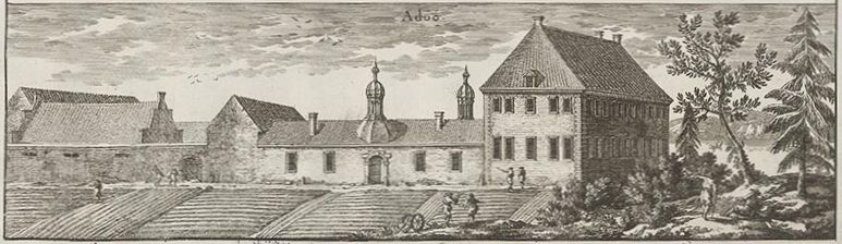 Ådö (Södermanland)